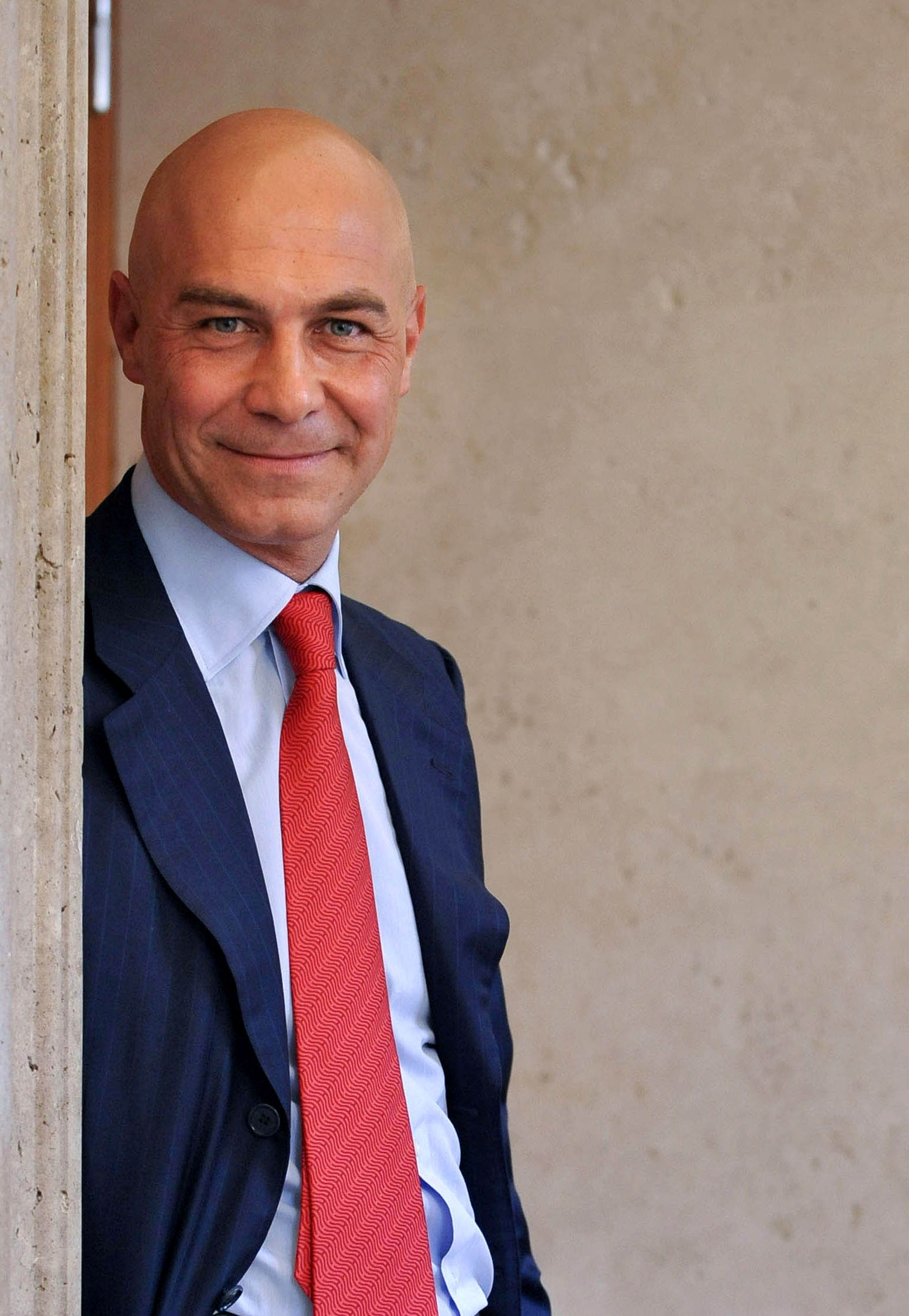 Una foto del deputato Guglielmo Vaccaro